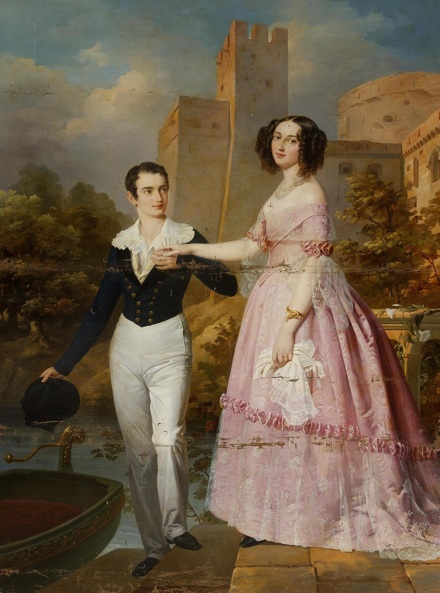 Графиня Ольга Александровна Орлова, урожденная Жеребцова (1807–1880) с сыном Николаем.